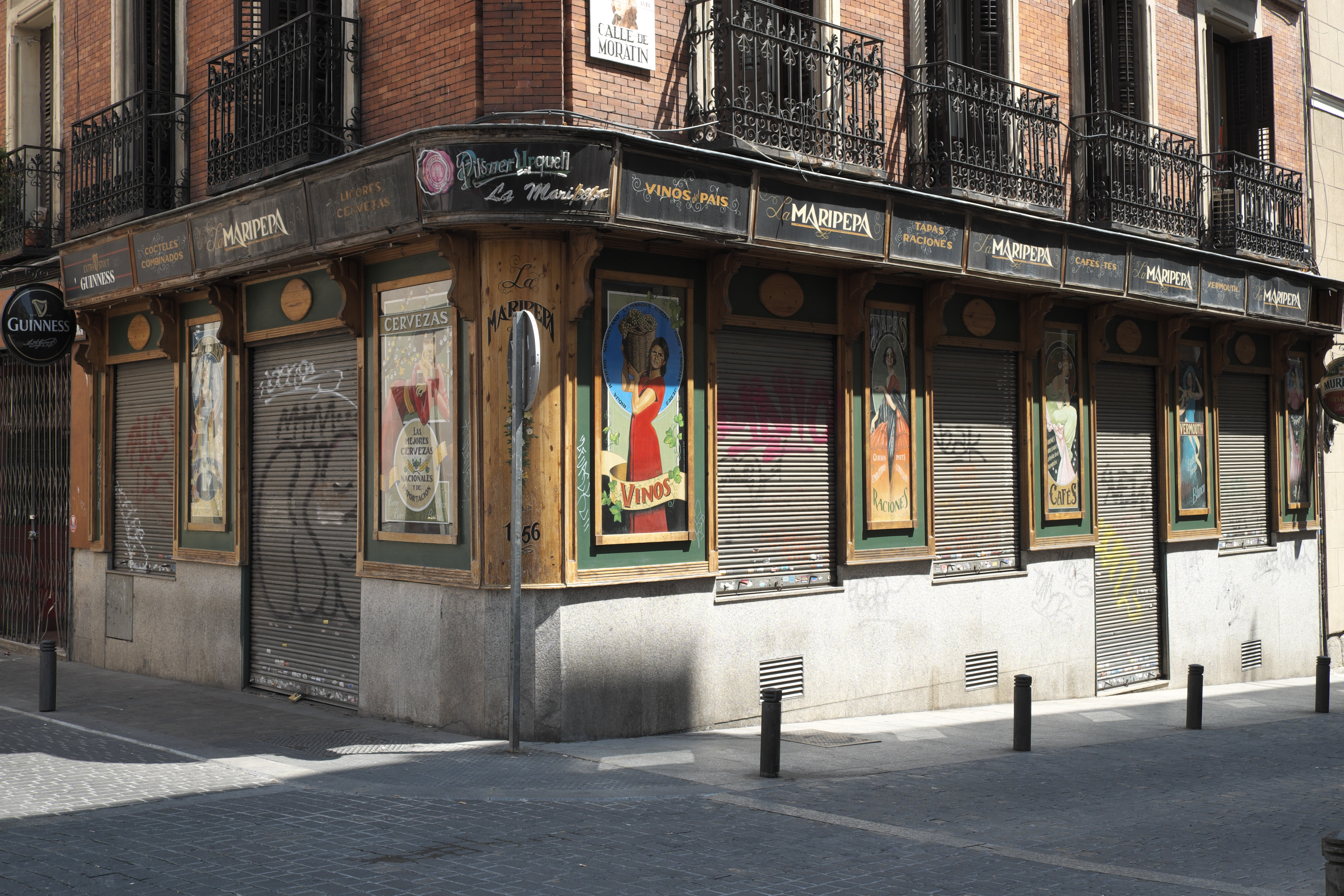 Bar La Maripepa in der Calle de Moratín in Madrid (Spanien), Werbeplakat